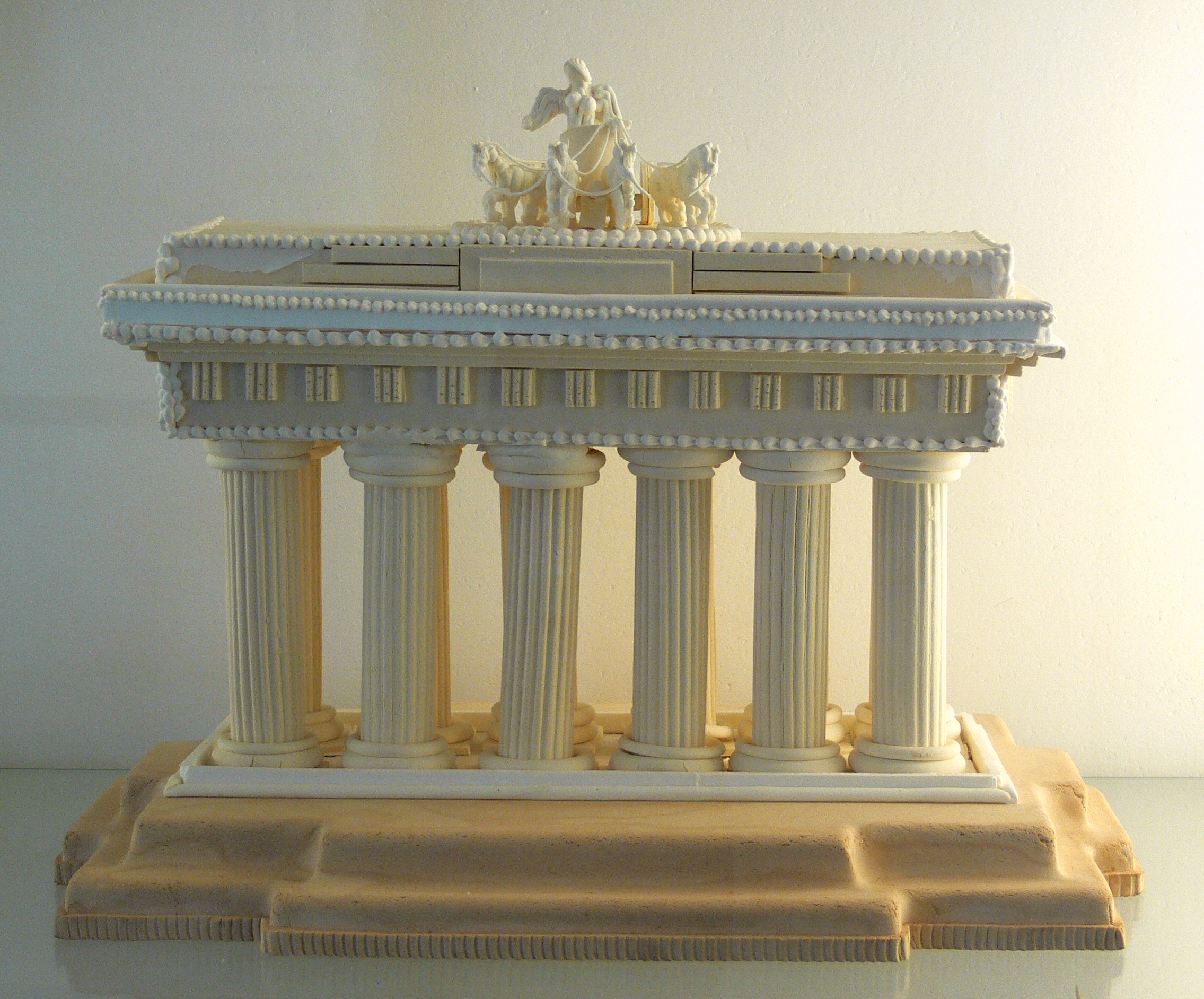 Zuckermodell des Brandenburger Tors, von Konditormeister Manfred Podlesny, Berlin 1984; Zucker-Museum Berlin